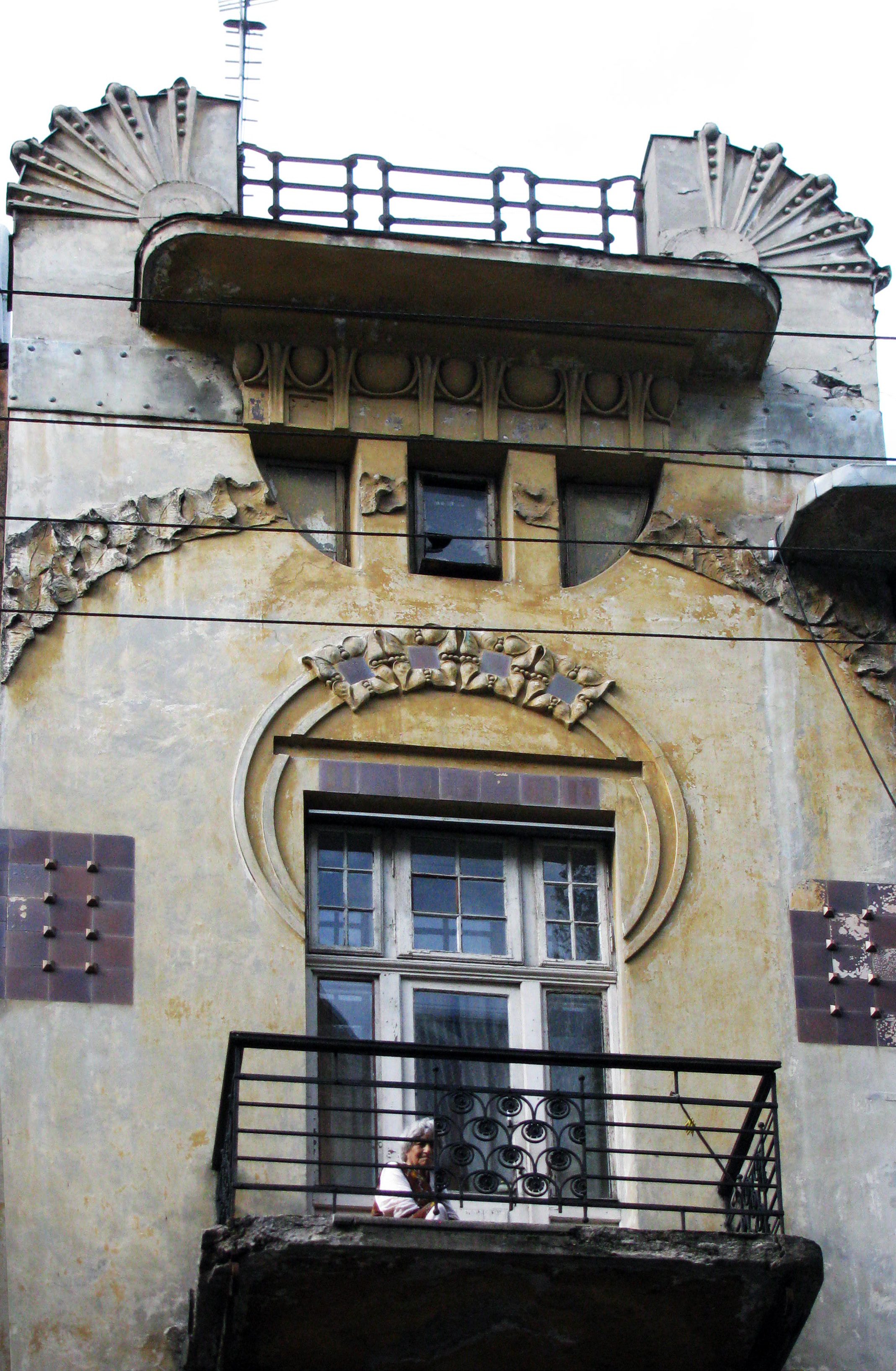 Будинок по вулиці Богомольця, 3 (Львів). Запроектований архітектурно-будівничим бюро Івана Левинського.